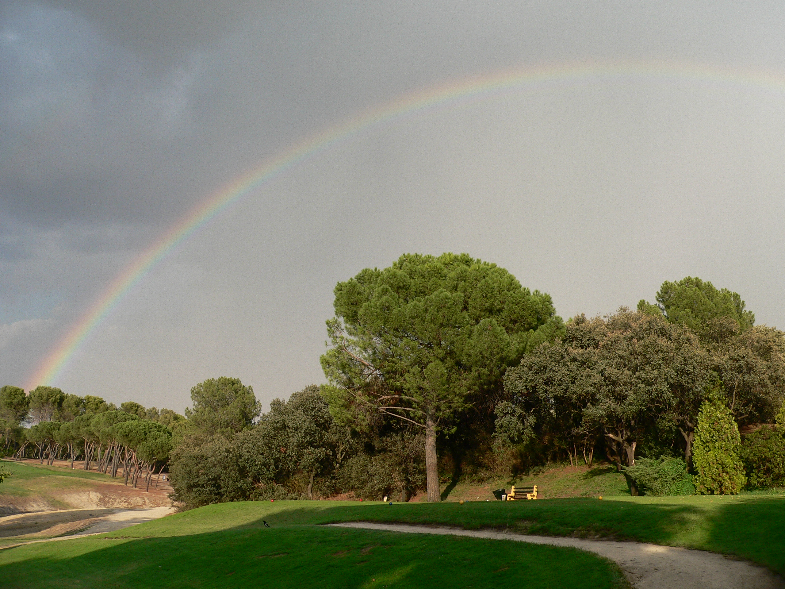 Arco iris sobre jardines Description: Rainbow Subject: Gardens and rainbow Place : Real Club Puerta de Hierro City : Madrid Country : Spain Photographer: © Manuel González Olaechea y Franco Shot date : September, 25th , 2005